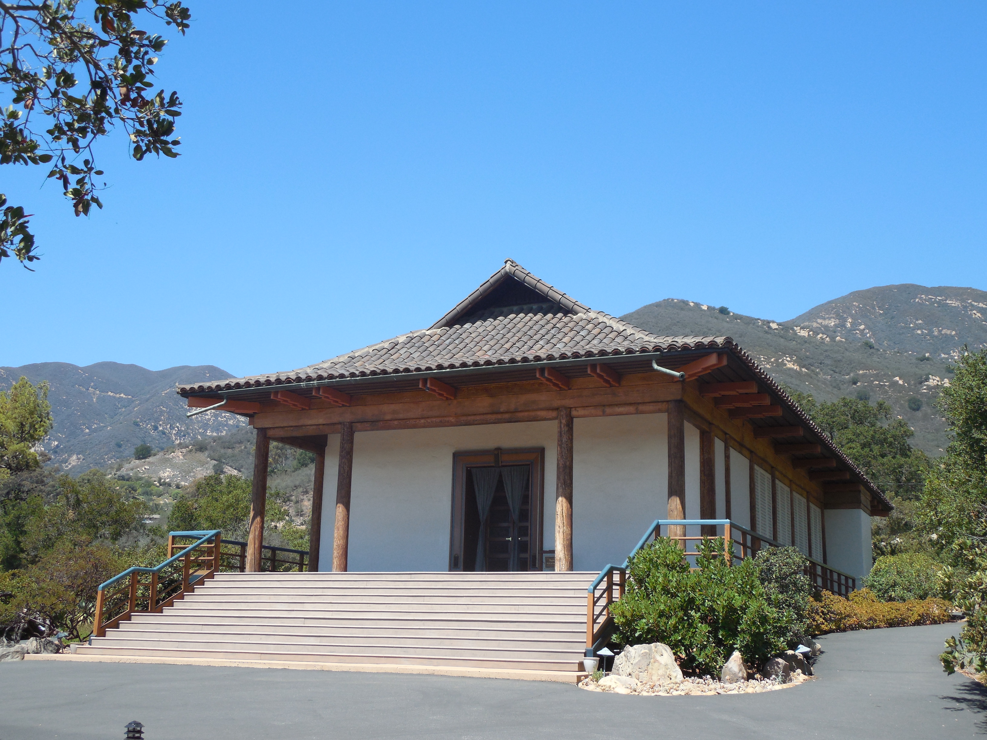 Vedanta Temple in Montecito, California